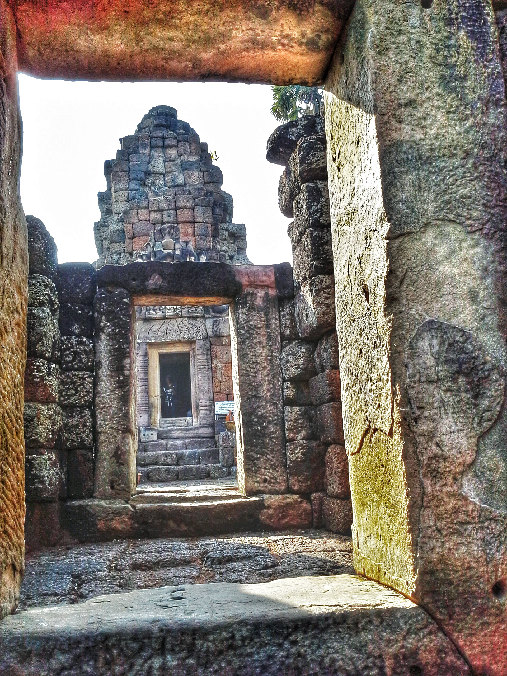 ปางกู่